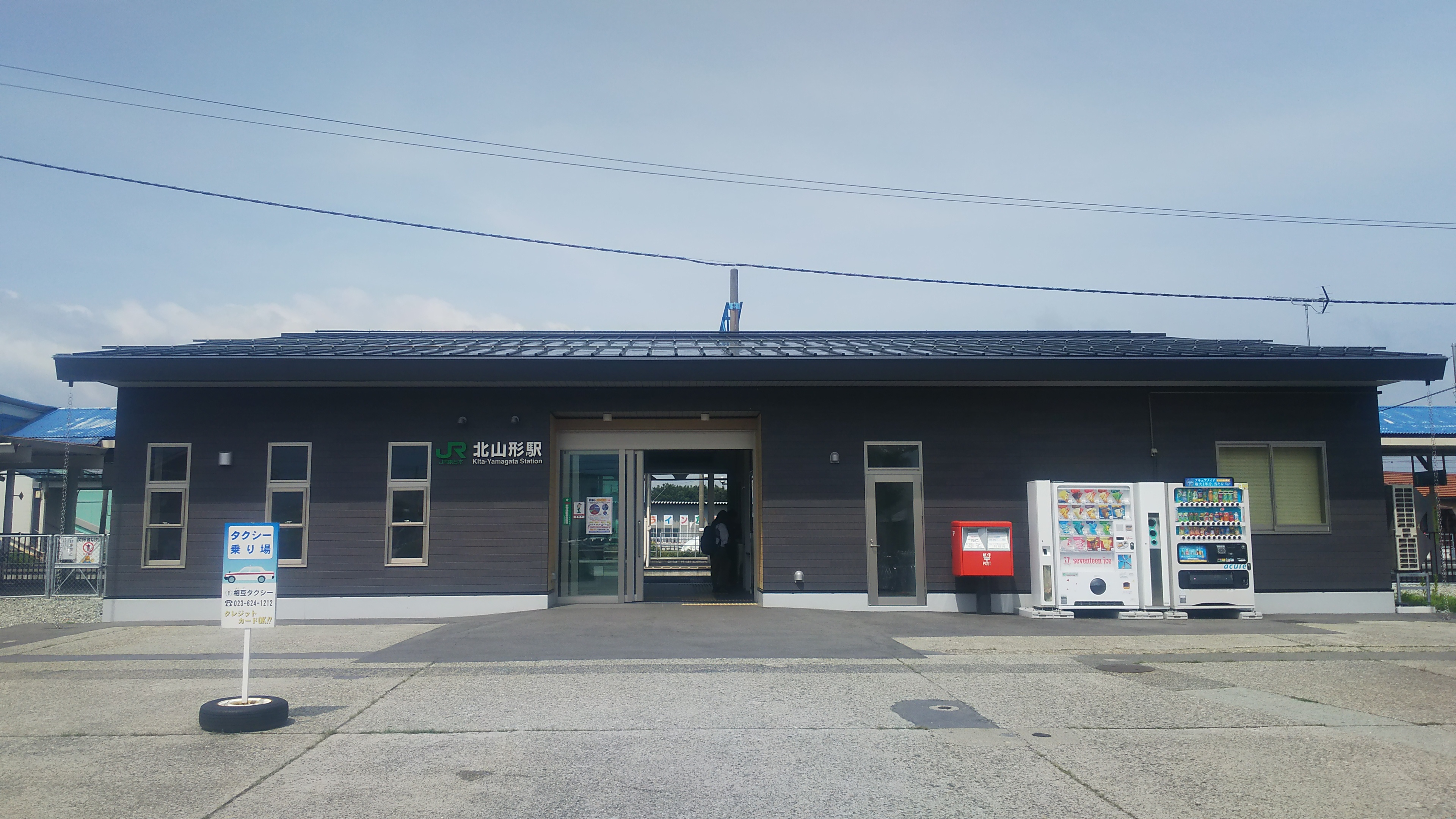 北山形駅東口駅舎